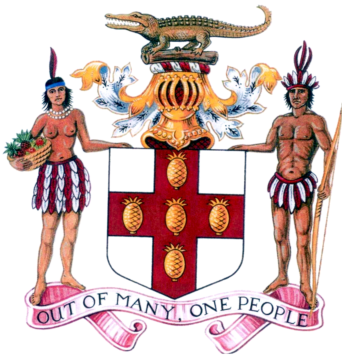 Wappen Jamaikas